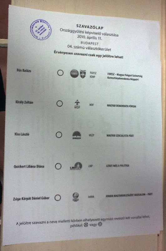 Szavazólap Budapest 4. választókörzetében (III. kerület) a 2010-es országgyűlési választások során